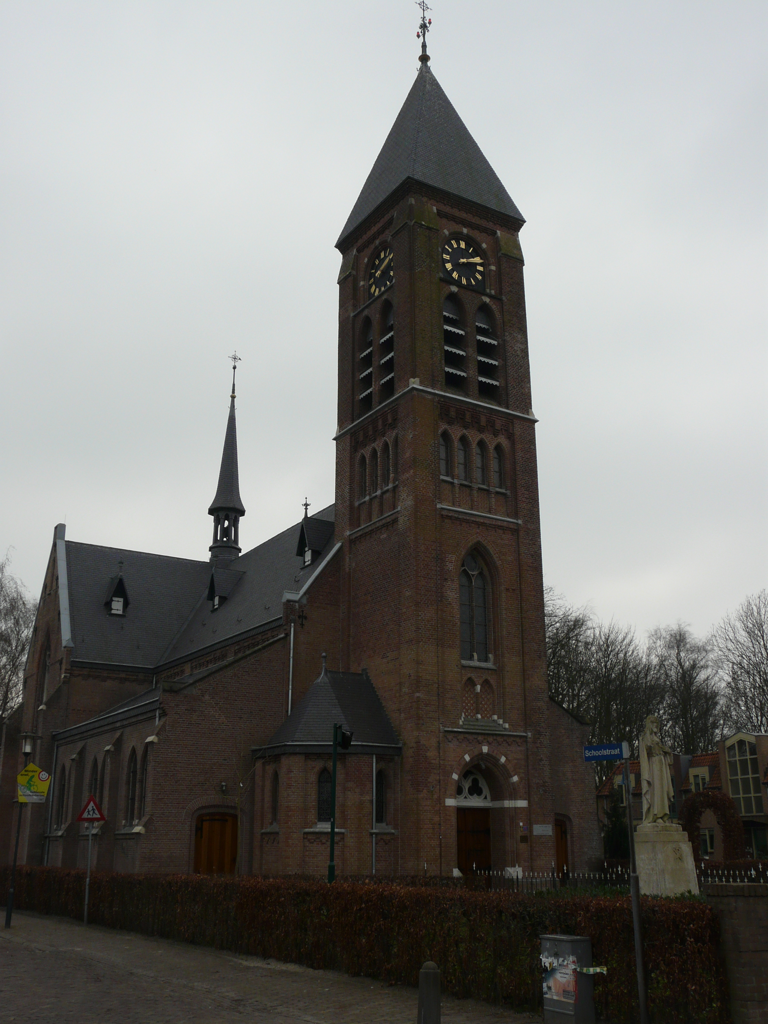 Sint-Annakerk in Molenschot